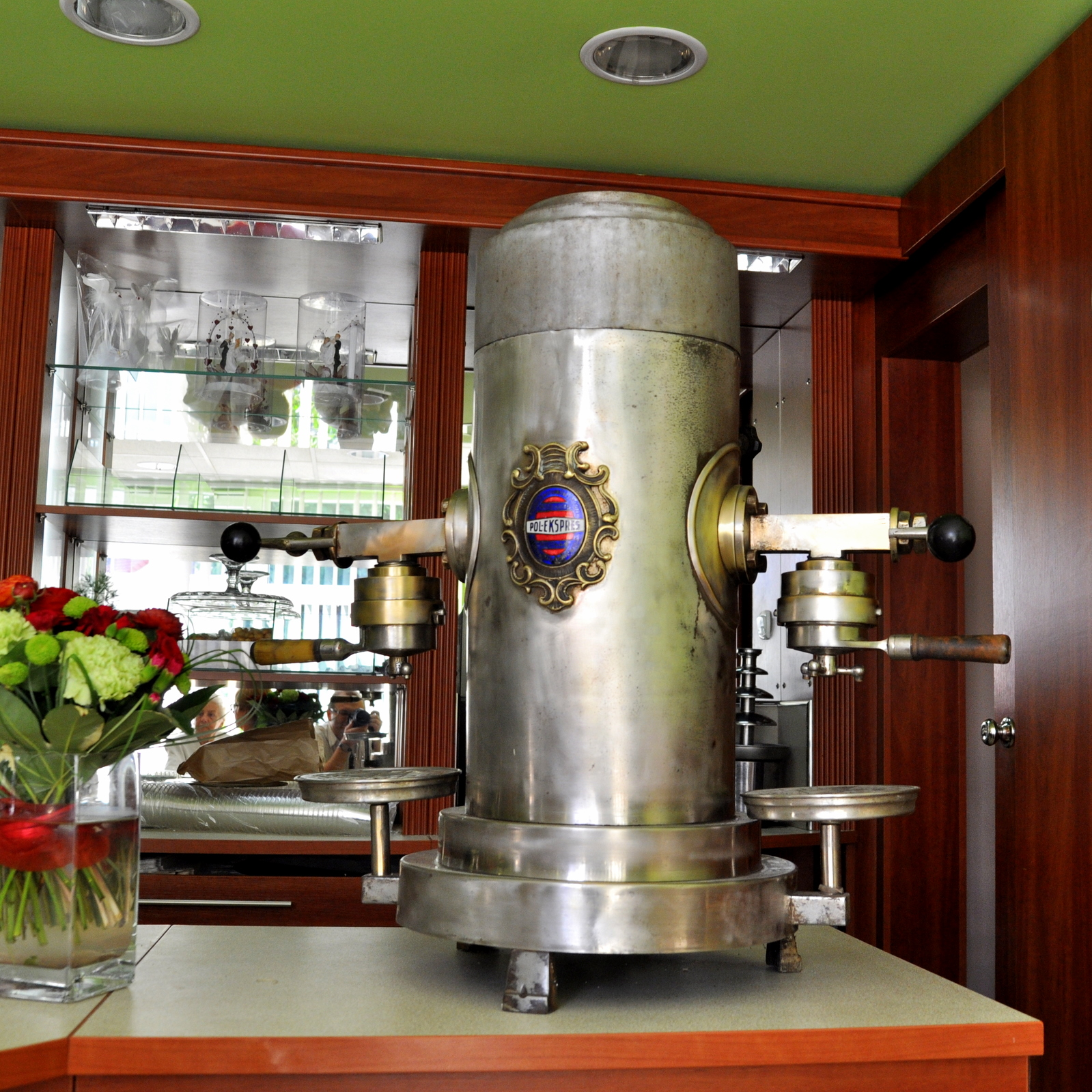 Ekspres do kawy z poznańskiej Fabryki Wyrobów Z Miedzi i Mosiądzu Kubsia i Gogołkiewicza " Pol-Ekspres" ( okres międzywojenny ), eksponowany w krotoszyńskiej cukierni przy ul. Gołębiej.